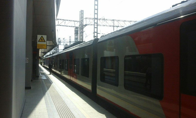 Скоростной электропоезд "Ласточка" на 5 пути станции Адлер.